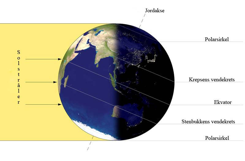 Solverv.